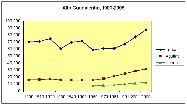 Población de los tres municipios, (1900-2005). Puerto Lumbreras se independizó de Lorca en los años cincuenta. The population of the municipalities of the Alto Guadalentín region, Murcia, Spain, (1900-2005). Lorca, Águilas (Aguilas) and Puerto Lumbreras. Own work, given to PD. Source: Instituto Nacional de Estadística.